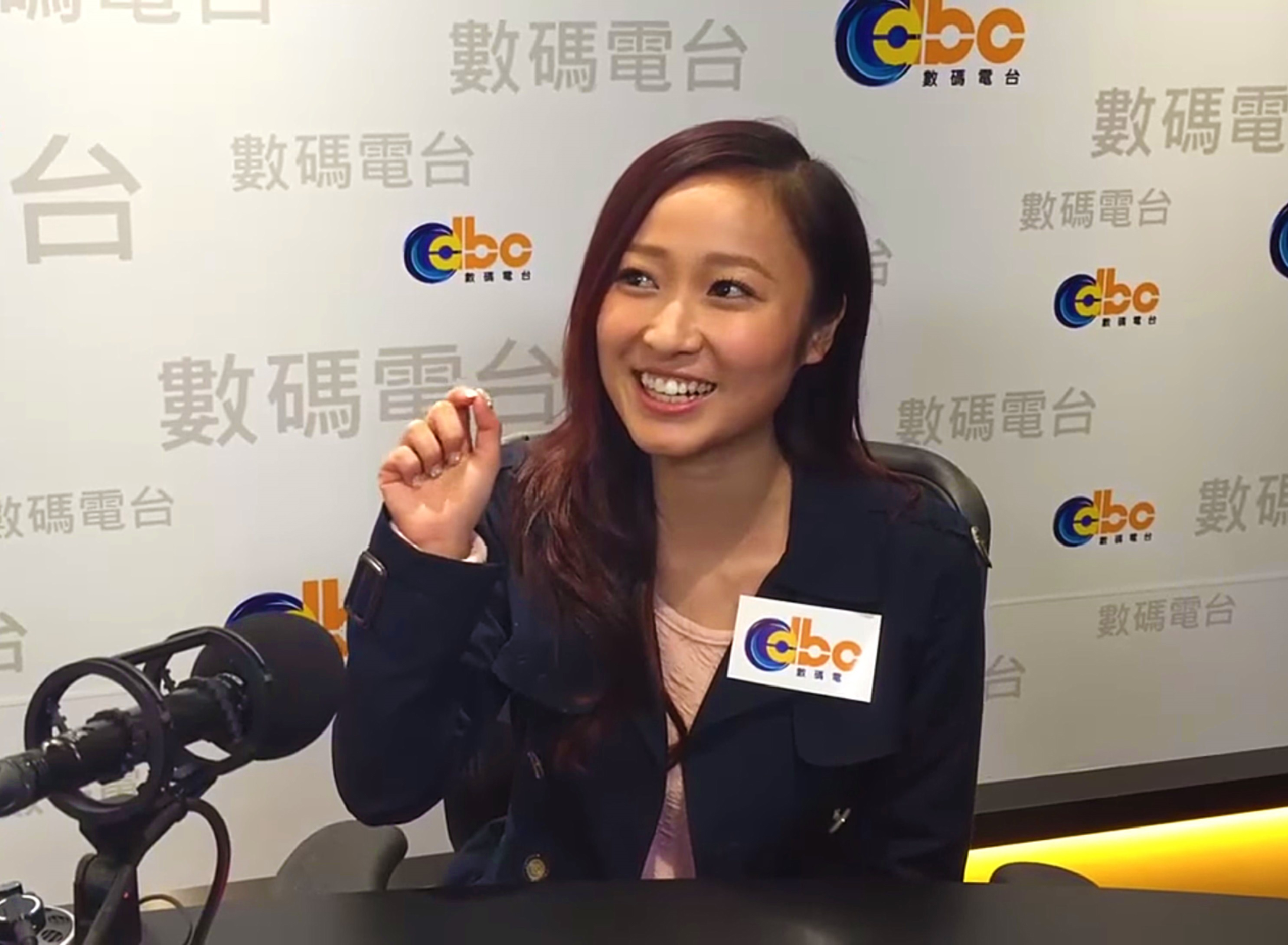 中文（香港）: 香港著名女童星，曾於電影《行運一條龍》飾演「小芬女」一角而成為街知巷聞的經典。